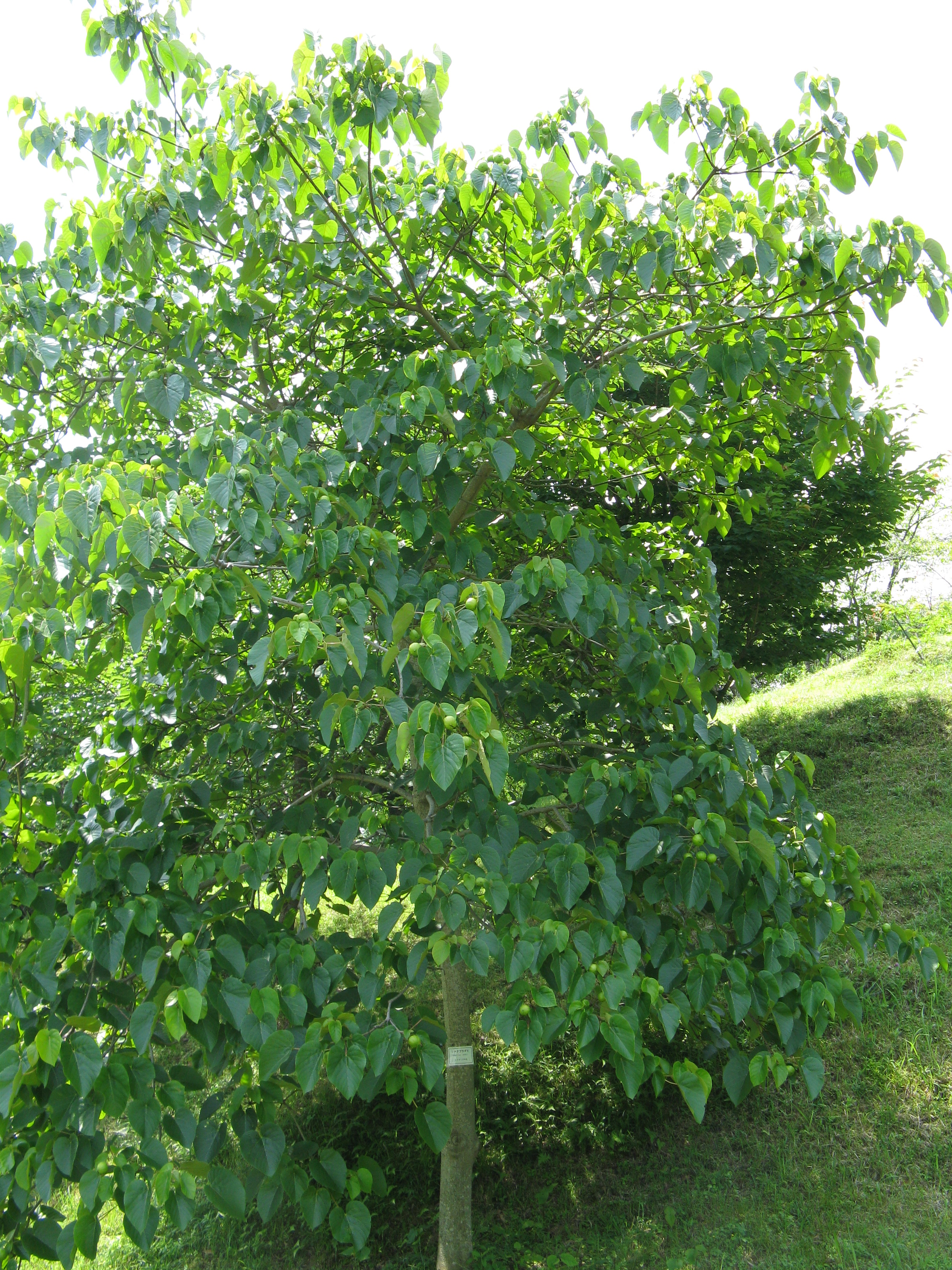 Scientific name Vernicia fordii